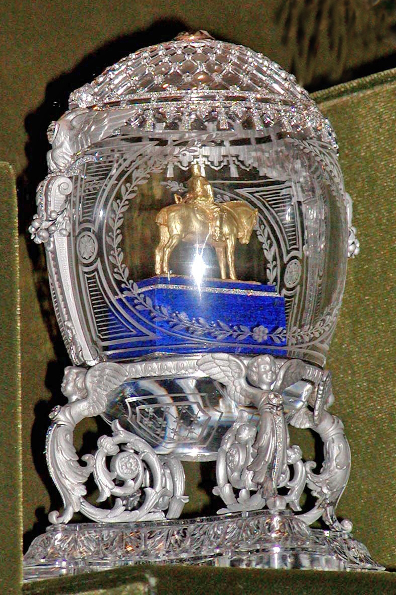 Fabergé-Ee mat Reider.